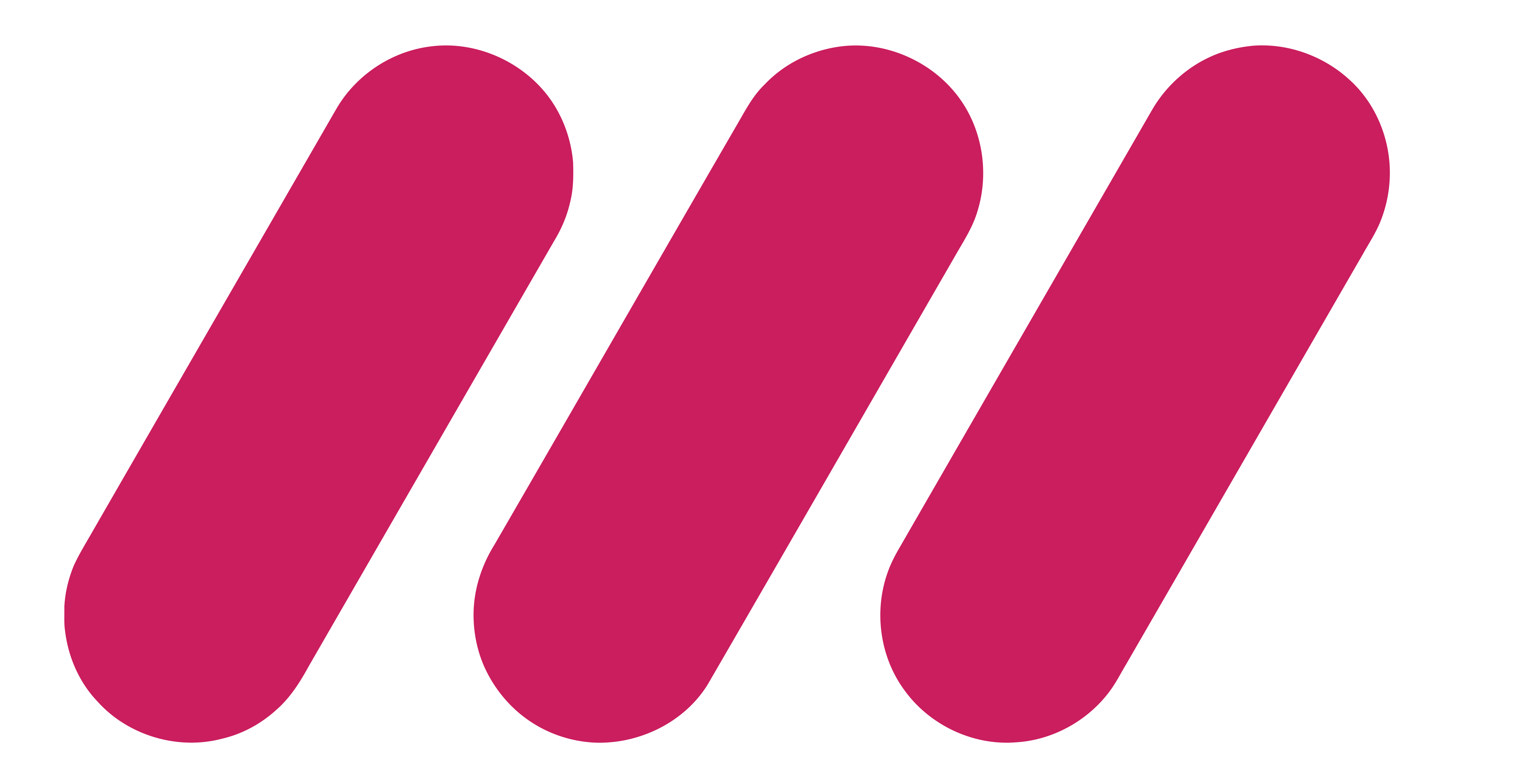 tv3 official logo